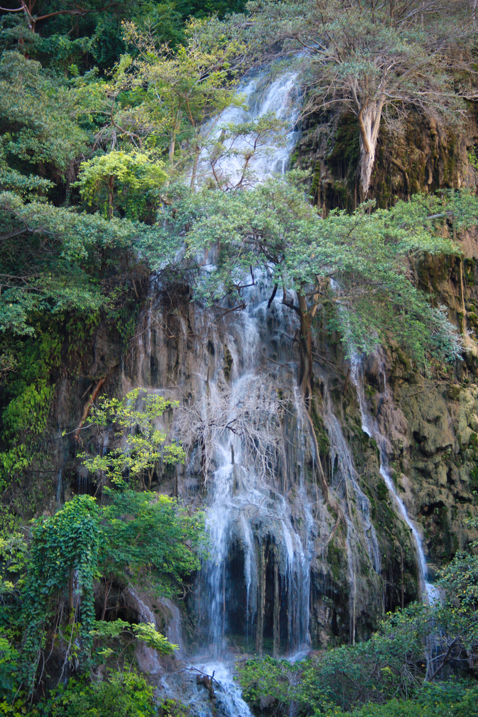 Grutas de Tolantongo